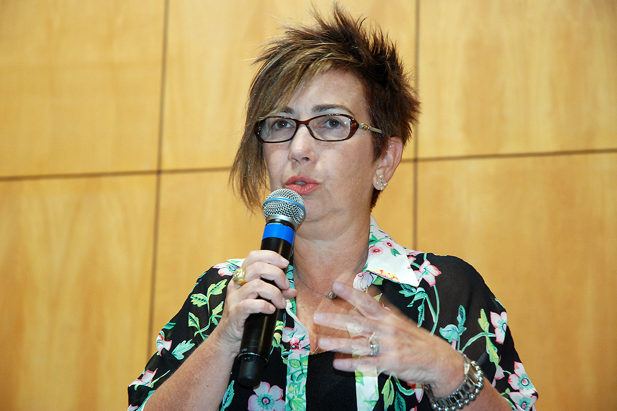 Seminário: Síndrome de Down - 21-03-2014 Foto: Reinaldo Carvalho